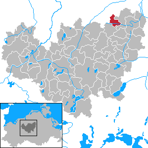 Lühburg in Mecklenburg-Vorpommern - District Güstrow